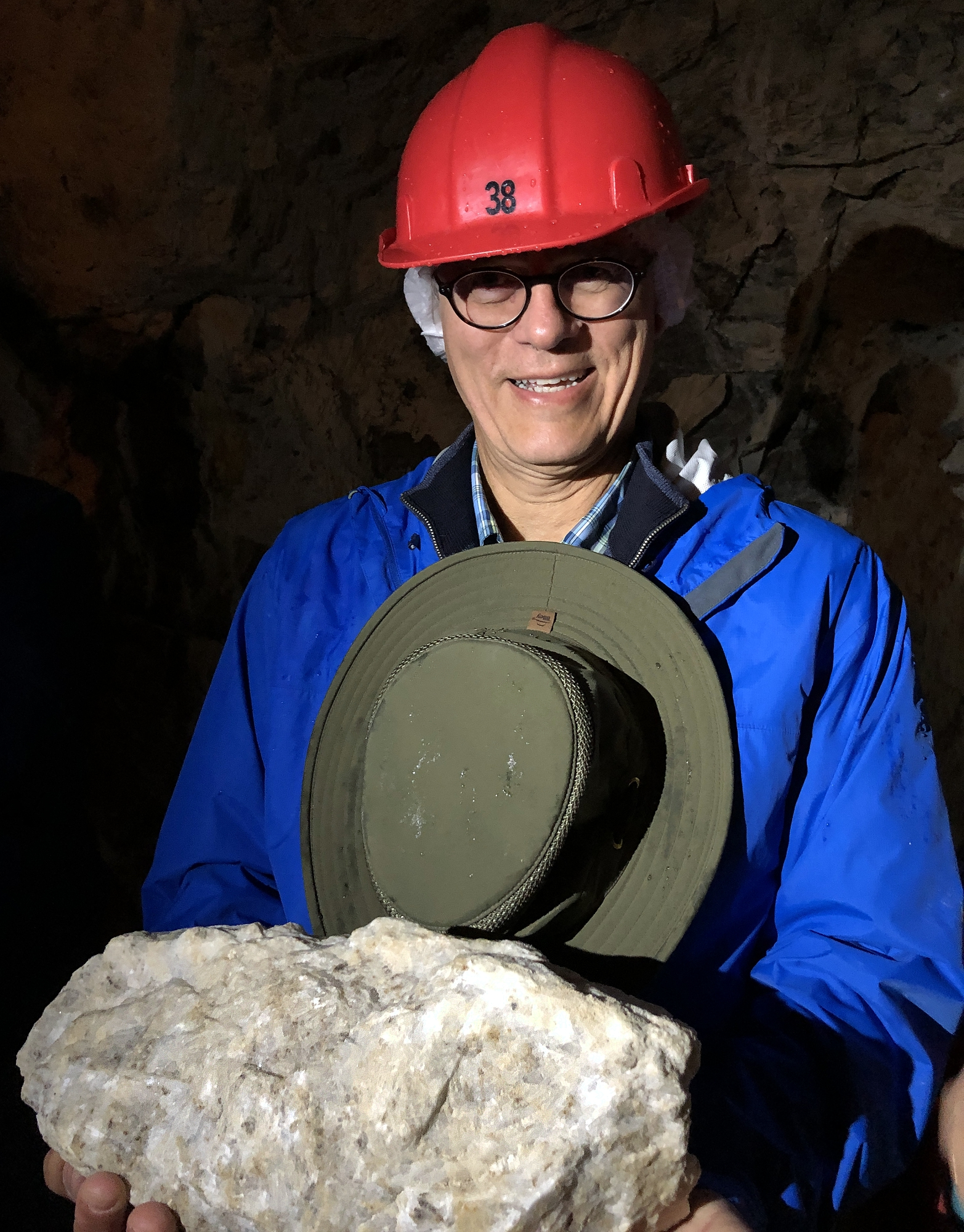 Образец барита в шахте по его добыче, Италия